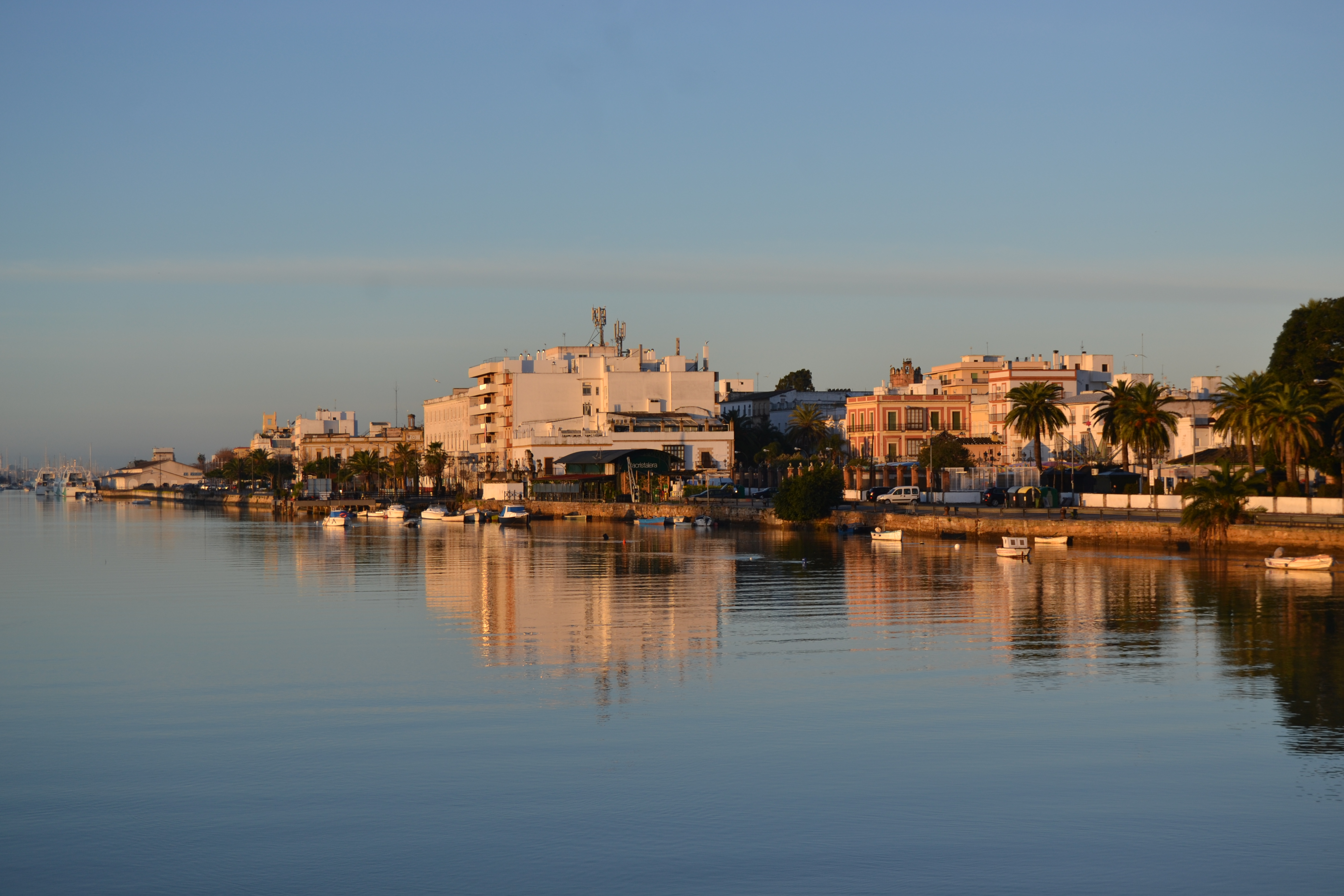 El Puerto de Santa María, Andalucía, España. Marzo de 2018. Desembocadura del Río Guadalete en El Puerto de Santa María.